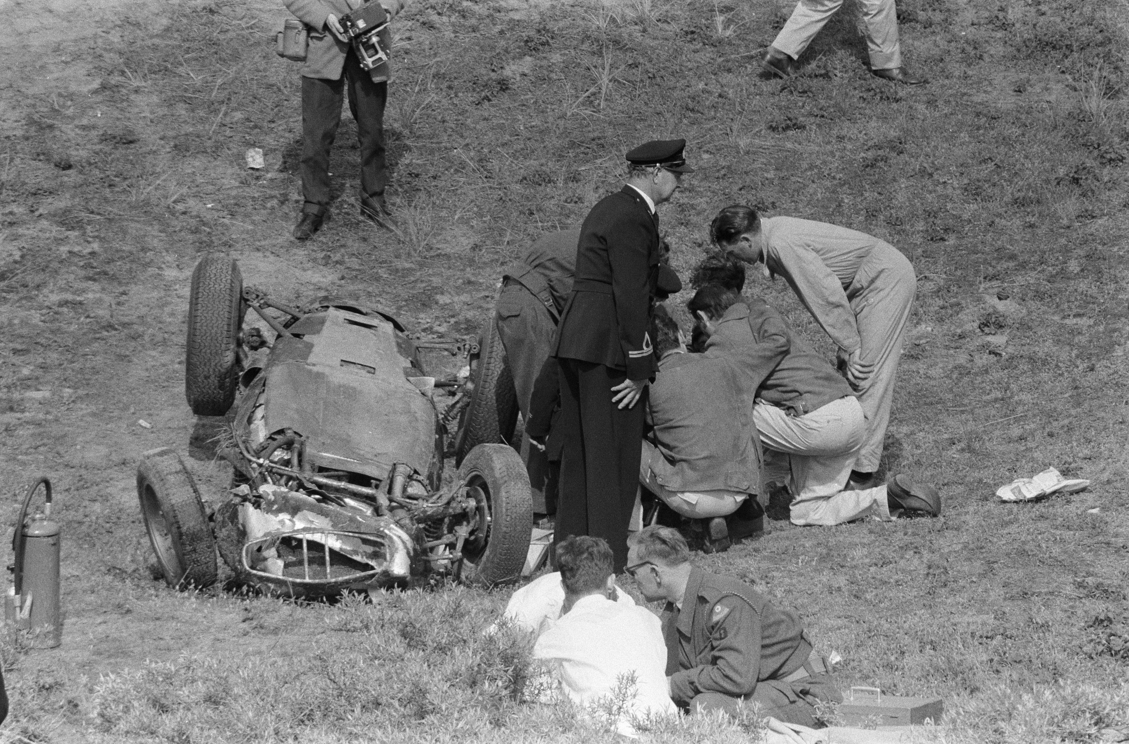 Collectie / Archief : Fotocollectie Anefo Reportage / Serie : Autoraces op het circuit van Zandvoort. Dan Gurney wandelt terug naar de pits nadat hij in de Tarzanbocht rechtuit is gereden en over de hekken is gevlogen met zijn BRM F1 wagen door een defect aan de remmen. Hierbij kwam jammerlijk een jonge toeschouwer Beschrijving : Autoraces op het circuit van Zandvoort. De verongelukte F1 BRM (wegens een defect aan de remmen) van de Amerikaan Dan Gurney. Hij overleeft de klap, maar een jonge toeschouwer komt om het leven. Datum : 6 juni 1960 Locatie : Noord-Holland, Zandvoort Trefwoorden : auto's, ongelukken, sport Persoonsnaam : BRM, Gurney Dan Fotograaf : Fotograaf Onbekend / Anefo Auteursrechthebbende : Nationaal Archief Materiaalsoort : Negatief (zwart/wit) Nummer archiefinventaris : bekijk toegang 2.24.01.05 Bestanddeelnummer : 911-3171